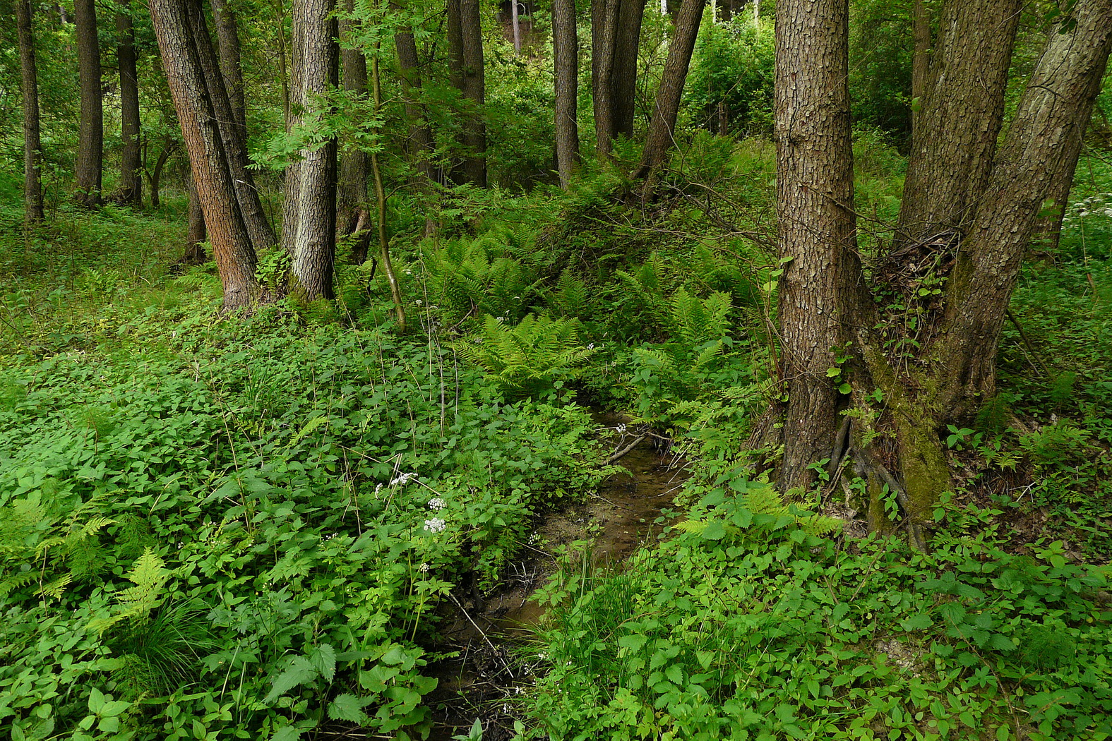 Prameniště Nedbalky v Českém ráji